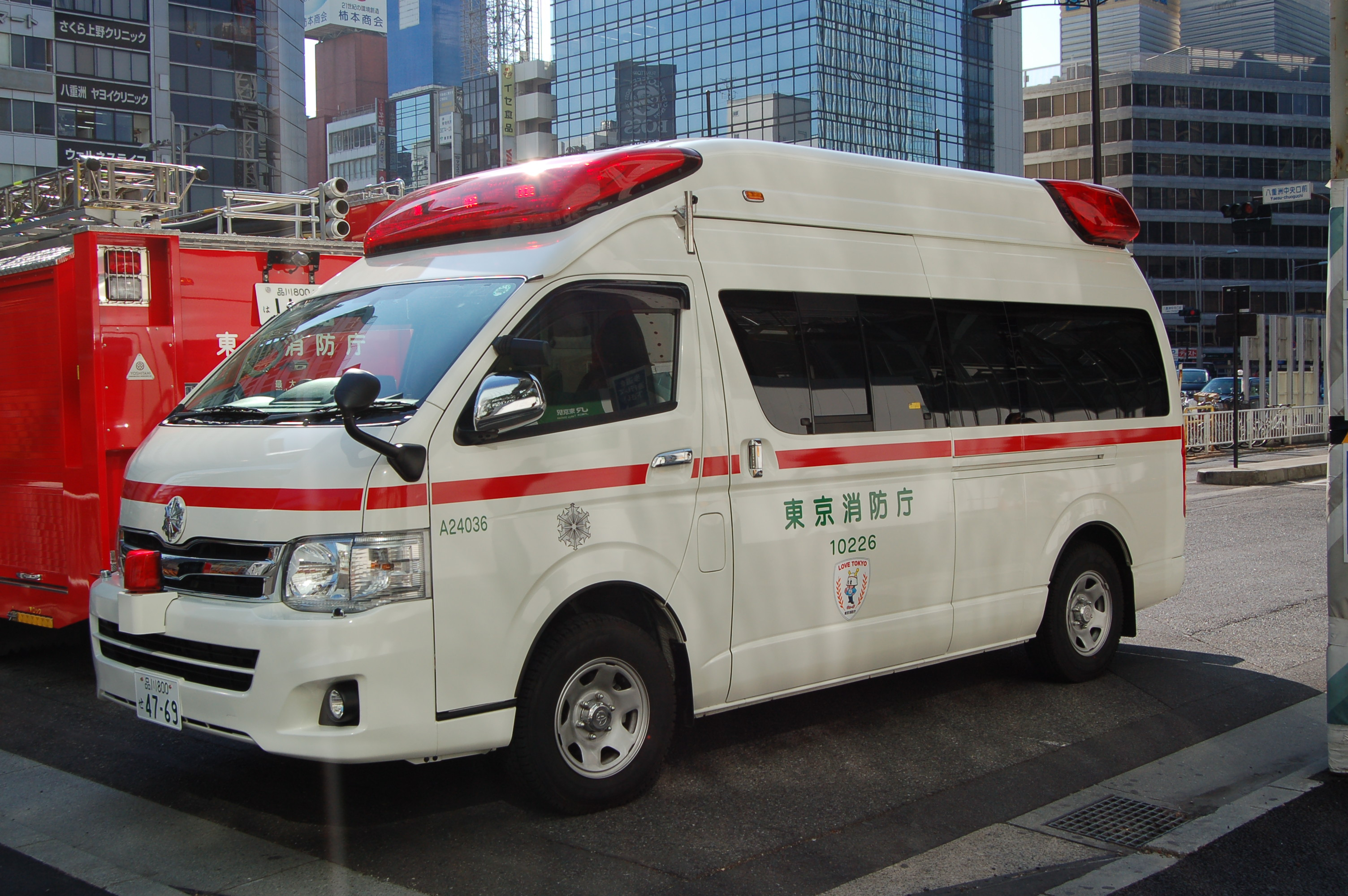 麹町消防署永田町出張所救急車